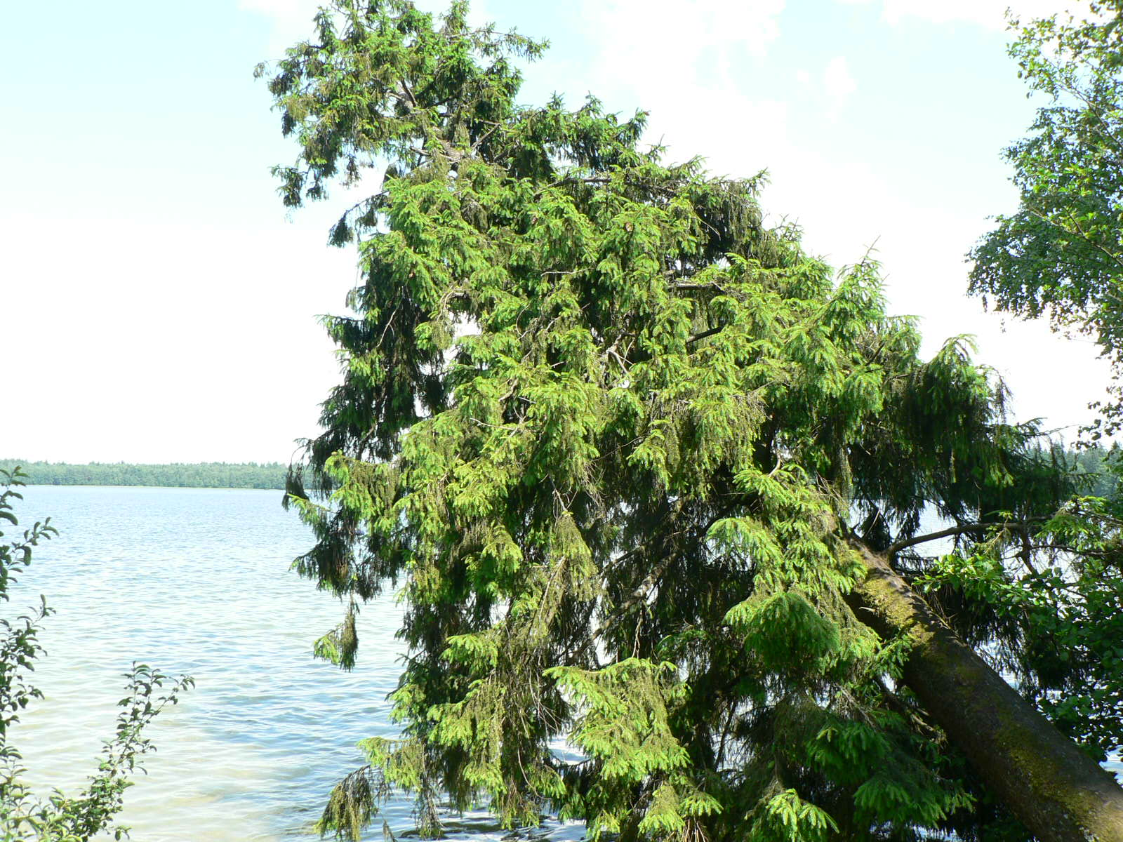 Świerk pochylony nad zachodnim brzegiem jeziora Świteź.Беларуская (тарашкевіца): Яліна на заходнім берагу Сьвіцязі.